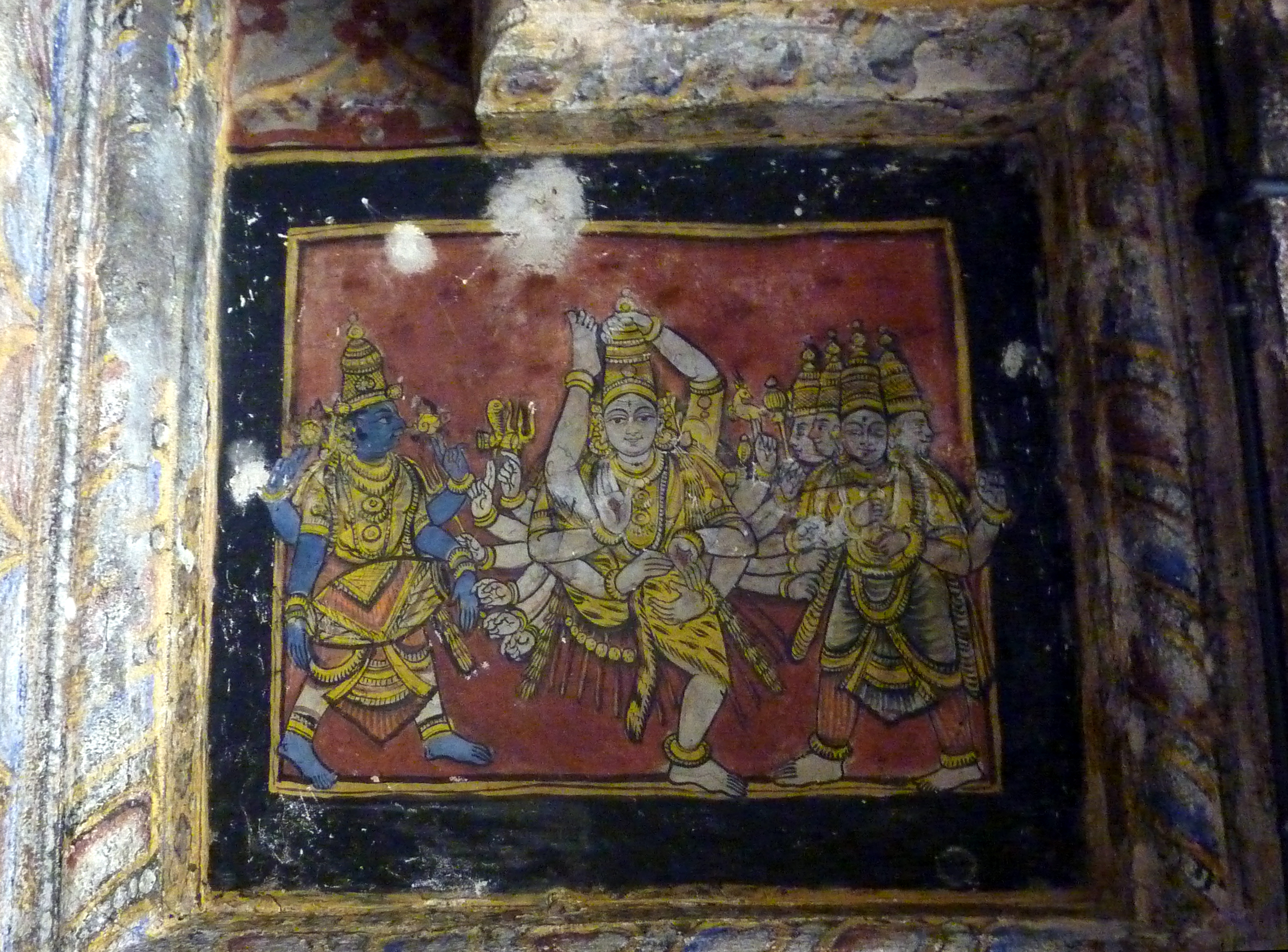 Urdhav Tandava by Shiva, Tanjore temple